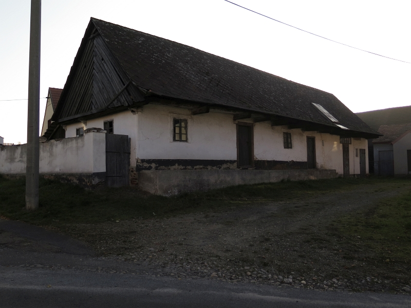 Usedlost čp. 9, Dolany 9, Dolany (okres Plzeň-sever).